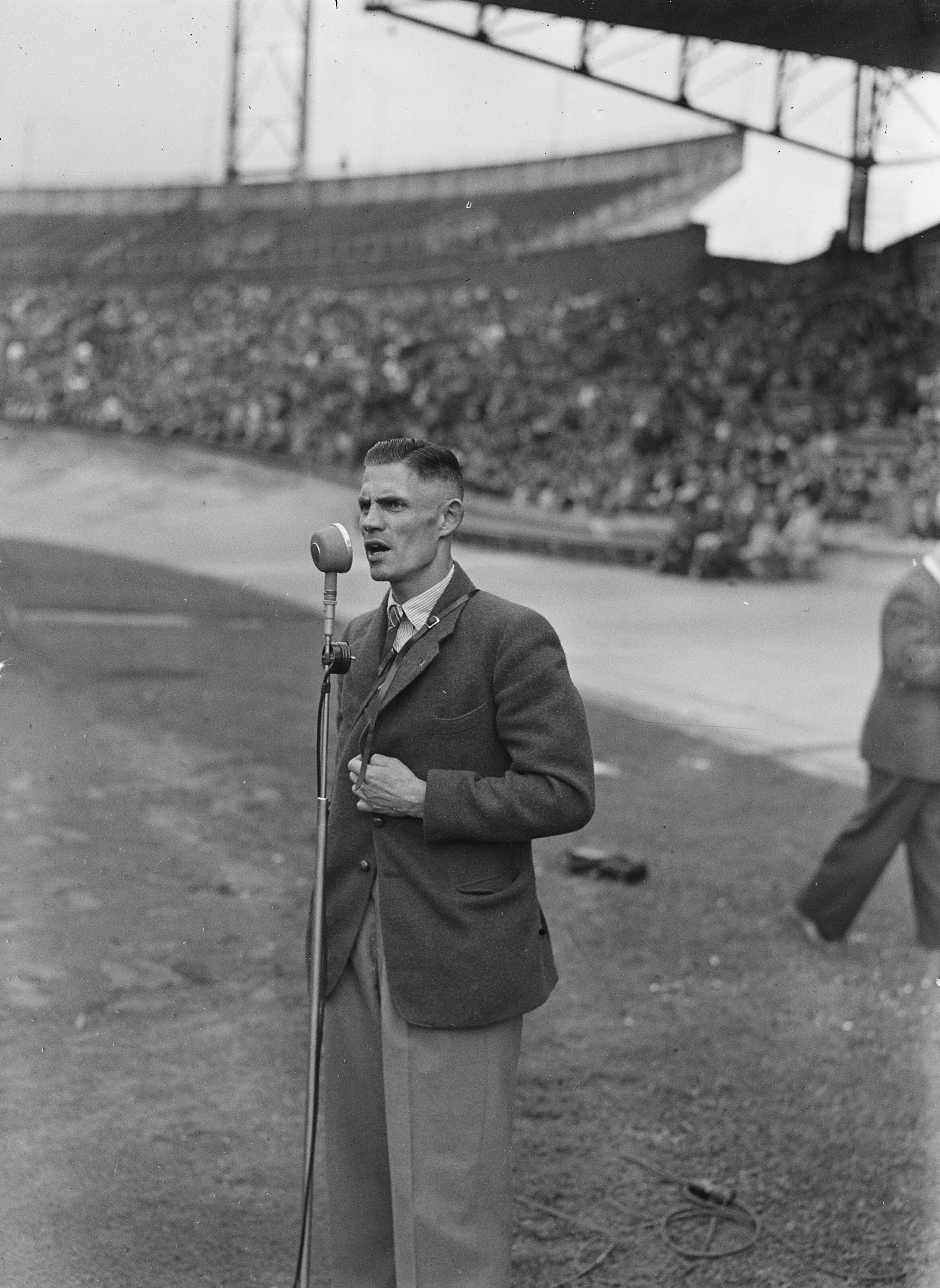 Collectie / Archief : Fotocollectie Anefo Reportage / Serie : [ onbekend ] Beschrijving : Speedwayraces in Olympisch Stadion. Tommy Price, wereldkampioen 1949, spreekt het publiek toe Annotatie : Vanwege een schouderblessure kon hij niet racen Datum : 27 augustus 1950 Locatie : Amsterdam Trefwoorden : speedway Persoonsnaam : Price, Tommy Instellingsnaam : Olympisch Stadion Fotograaf : Nijs, Jac. de / Anefo Auteursrechthebbende : Nationaal Archief Materiaalsoort : Glasnegatief Nummer archiefinventaris : bekijk toegang 2.24.01.09 Bestanddeelnummer : 904-1539